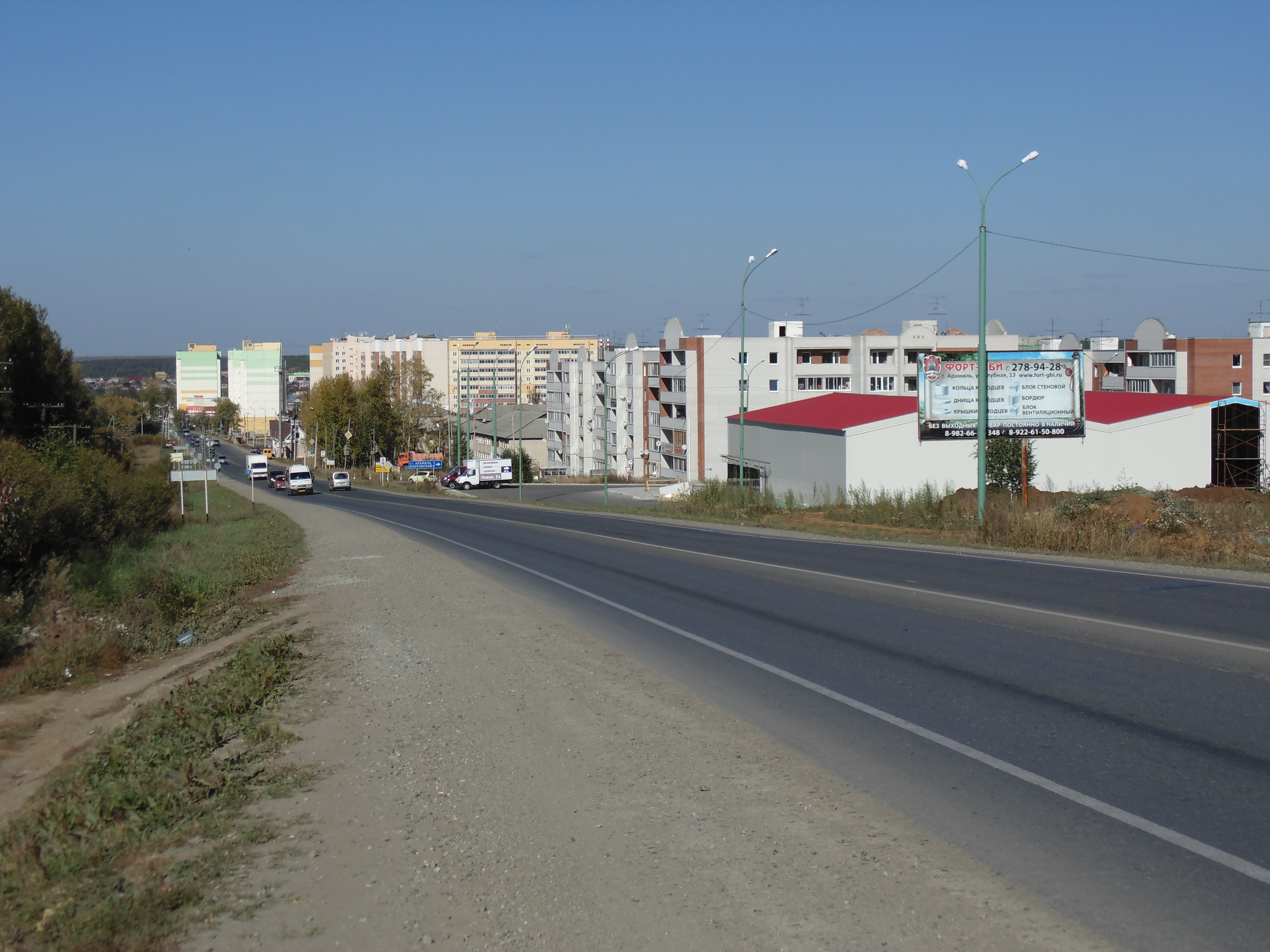 город Арамиль со стороны Бородулинской горки.